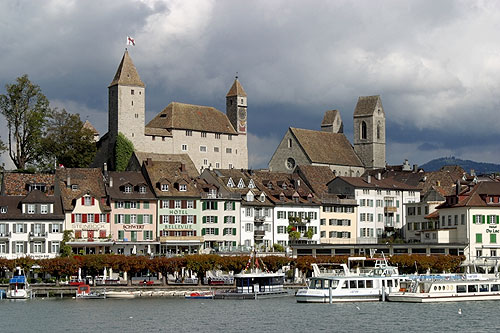 Schloss Rapperswil mit Stadtkirche und Hafen von Süden